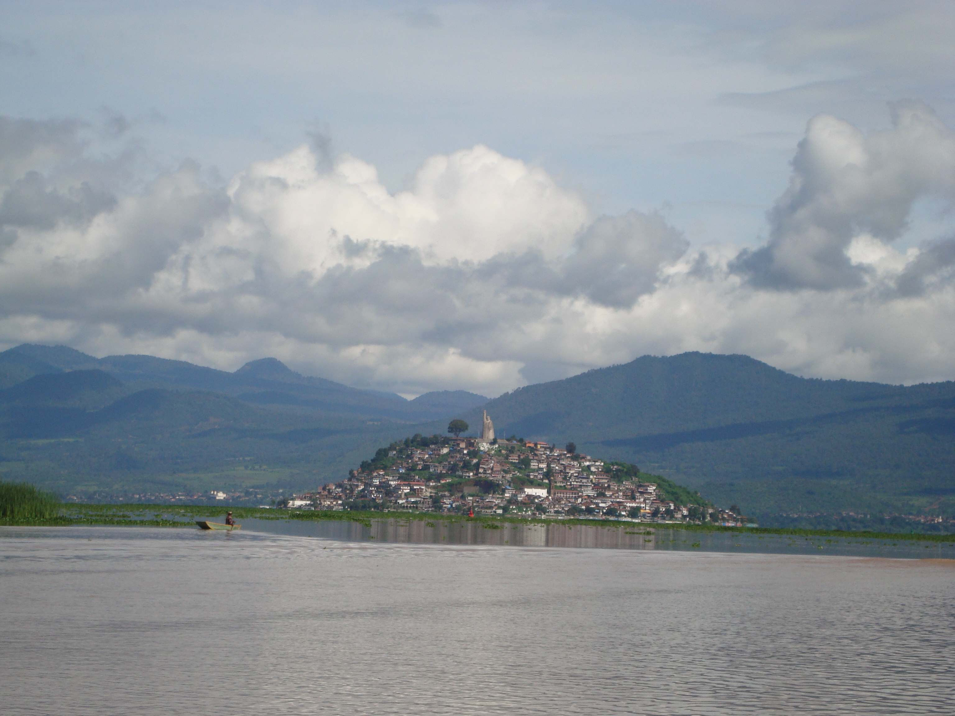 Isla de Janitzio, desde el Lago de Pátzcuaro